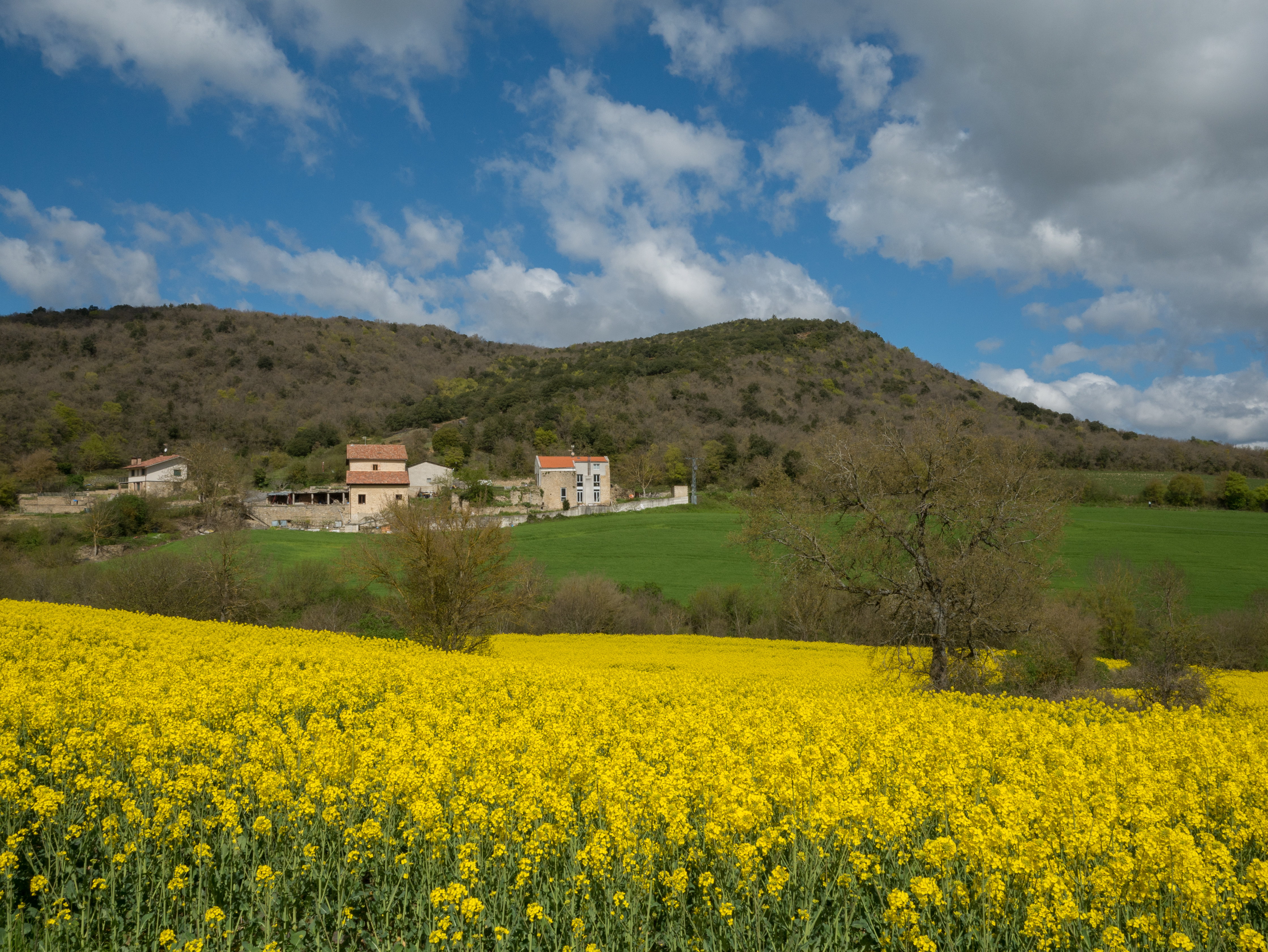 Vista de Eskibel, caseríos de Eskibel y monte Eskibel. Campo de colza. Vitoria-Gasteiz, País Vasco, España